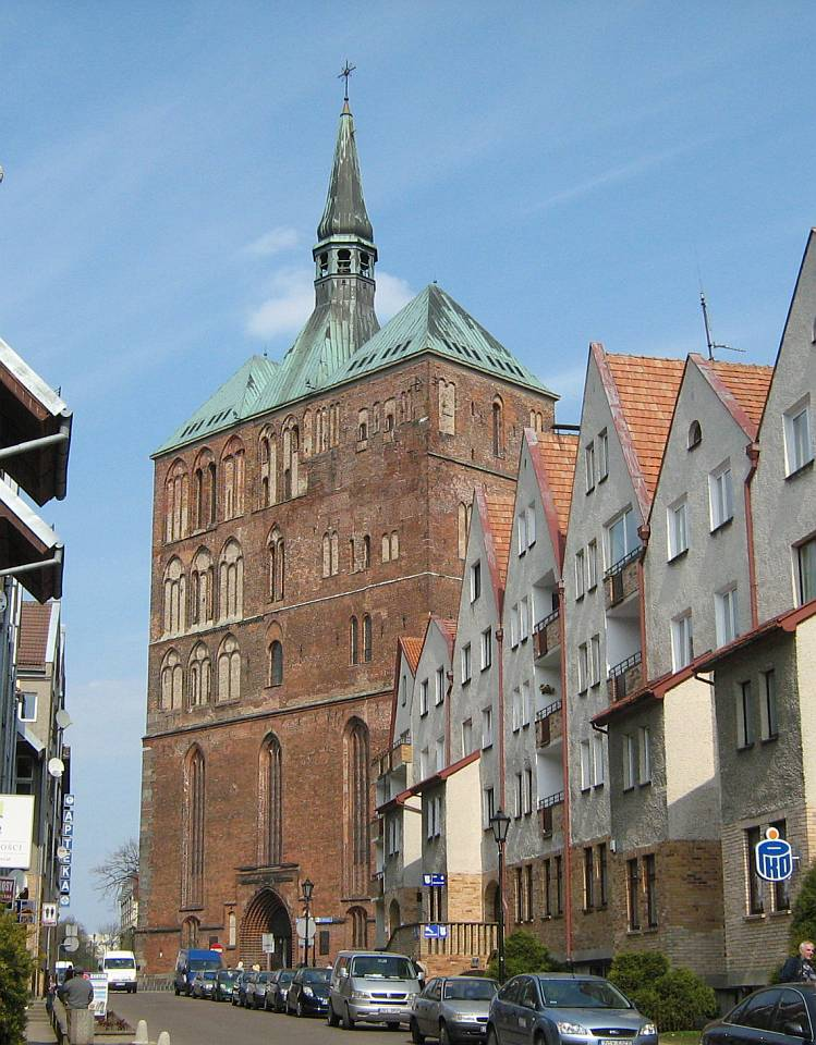 Katedra kołobrzeska.